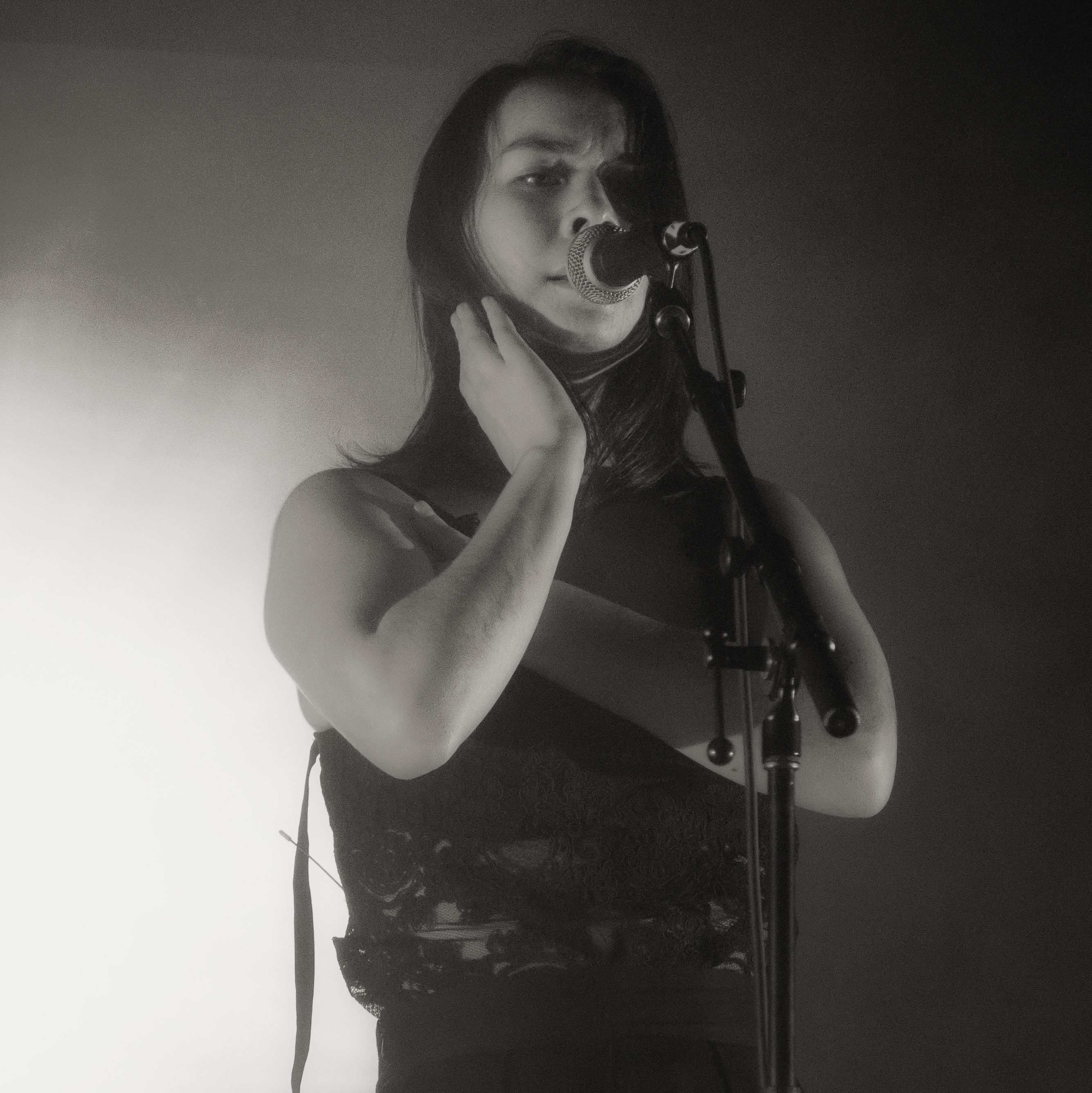 Mitski